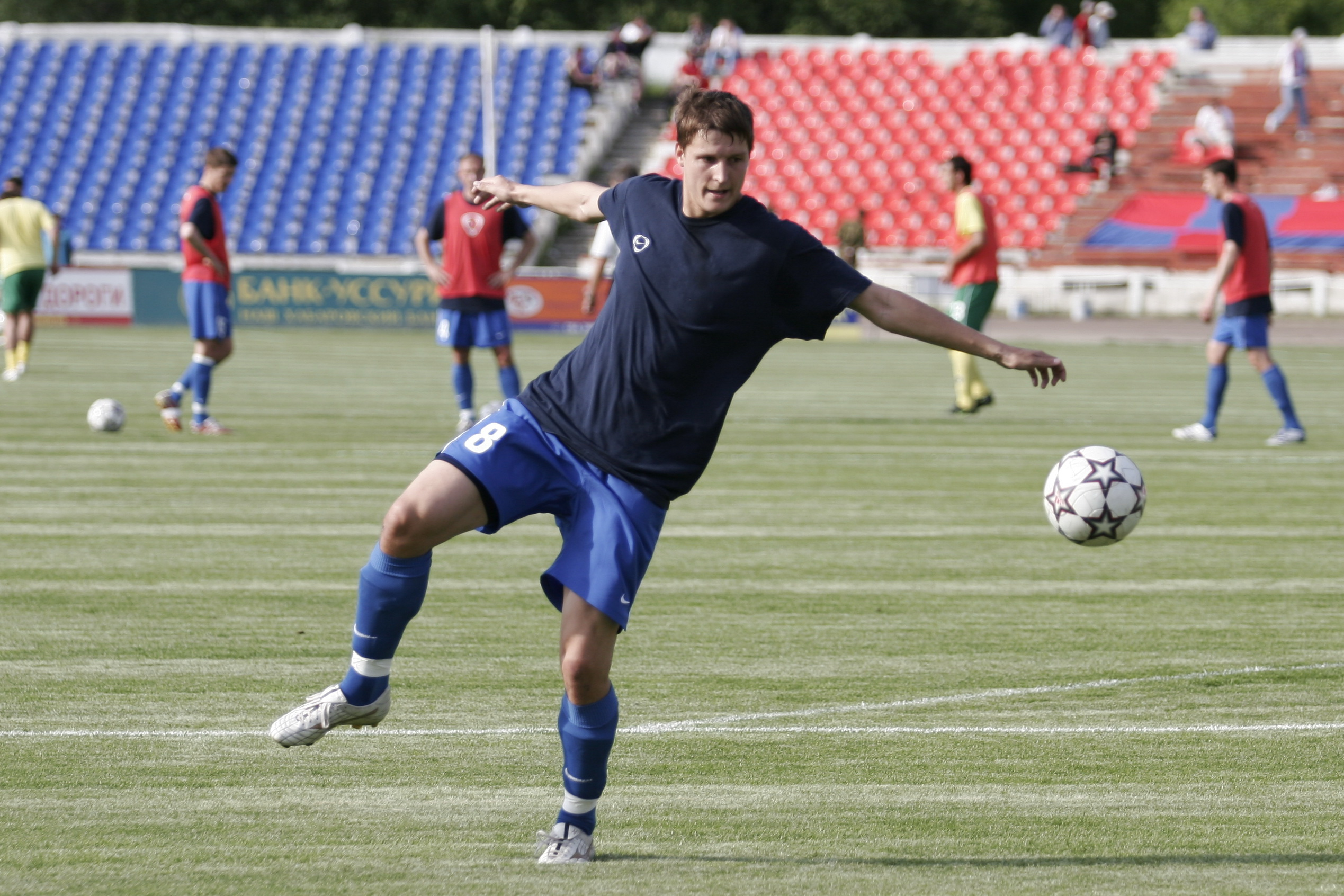 Фото сделано в городе Хабаровск, на стадионе имени Ленина в 2008 году. Идет тренировка команды СКА-Энергия. На переднем плане по мячу бьет Василий Кармазиненко.